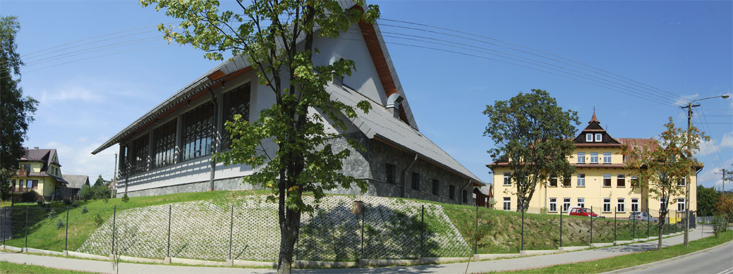 Technikum i Zasadnicza Szkoła Zawodowa